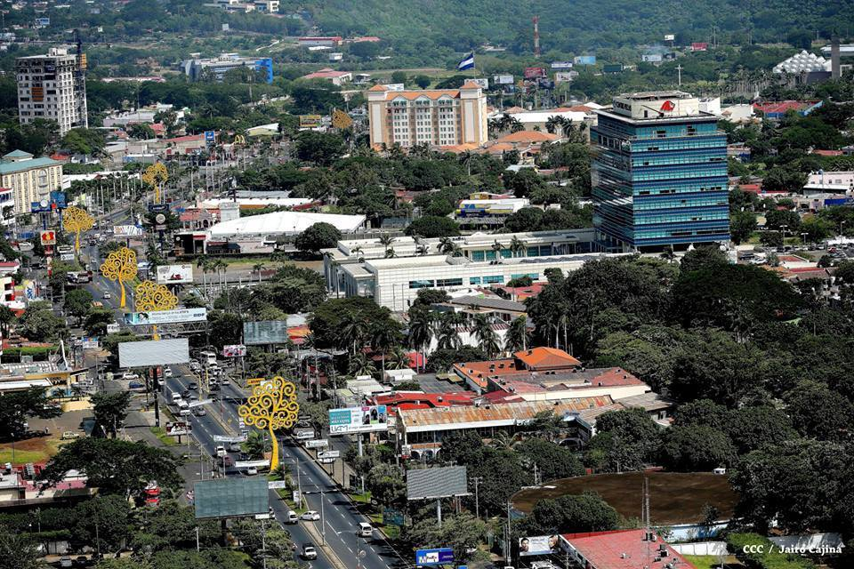 En La Imagen Observamos la carretera a Masaya y el downtown en la imagen se muestra una parte de este, donde se encuentran hoteles, malls, edificios de apartamentos, sedes de empresas ect